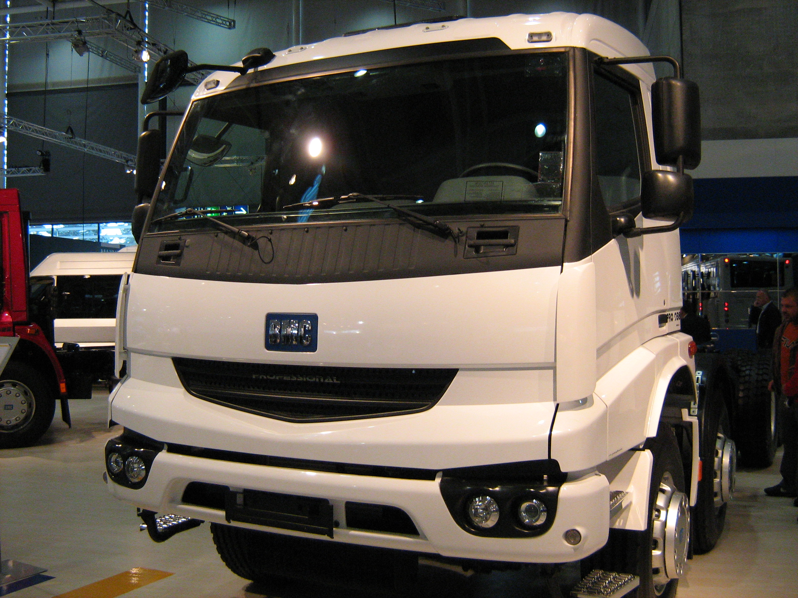 BMC - LKW aus der Türkei (IAA 2008).